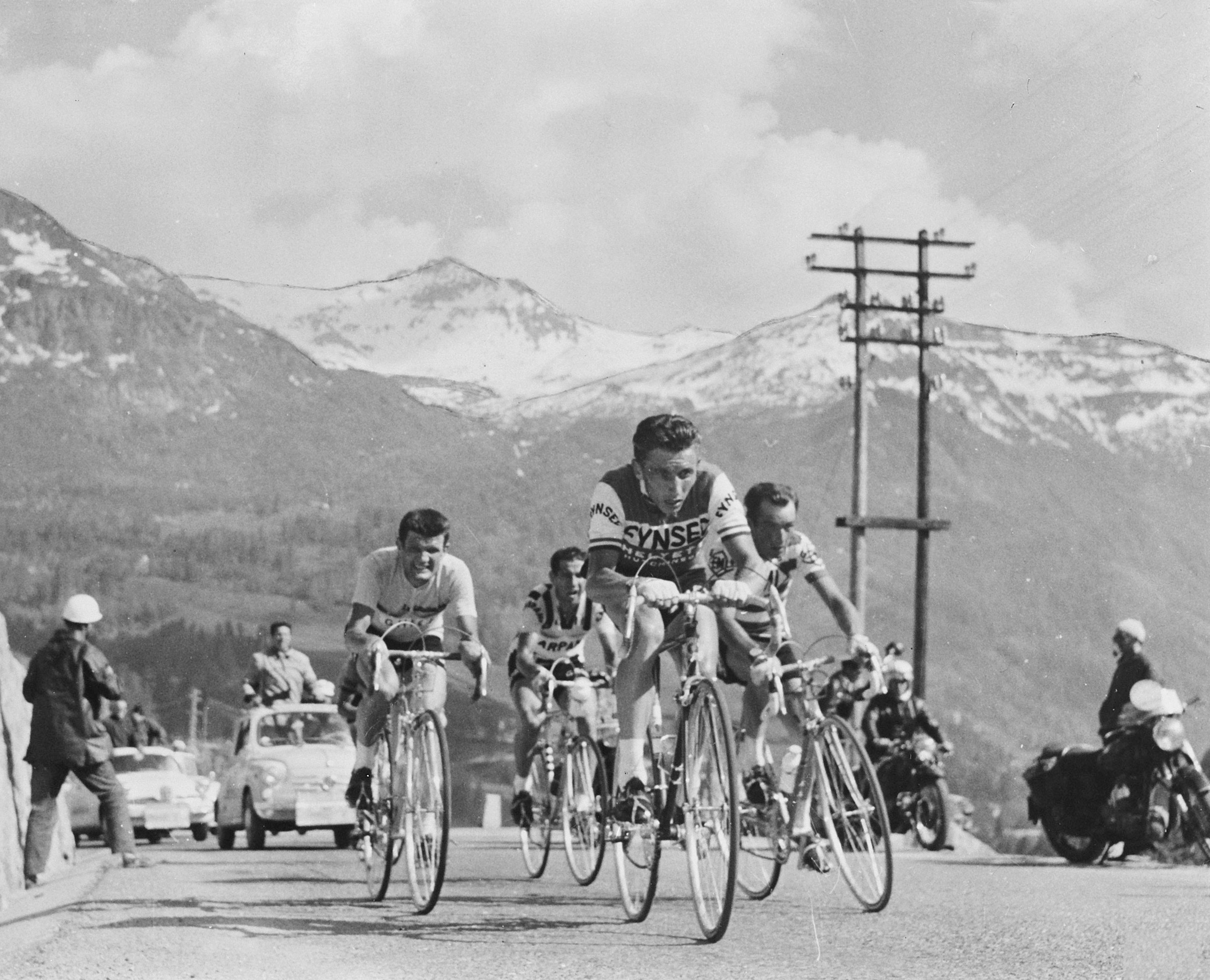 43ste Ronde van Italie , Anquetil, Gaul, Hovenaars en Nencini